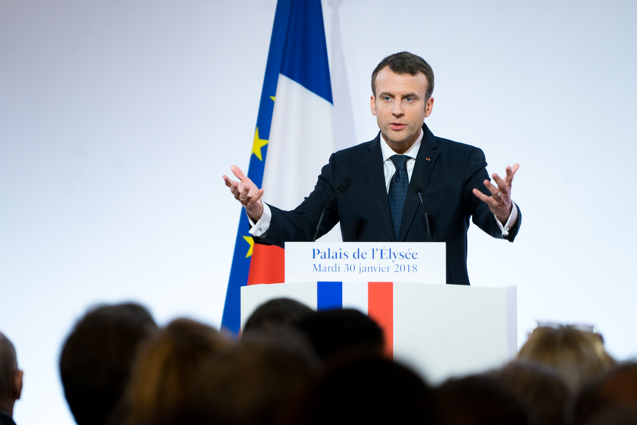 Emmanuel Macron